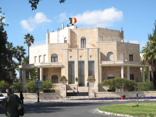 Jérusalem, Quartier de Talbia, 21 rue Balfour - Consulat de Belgique